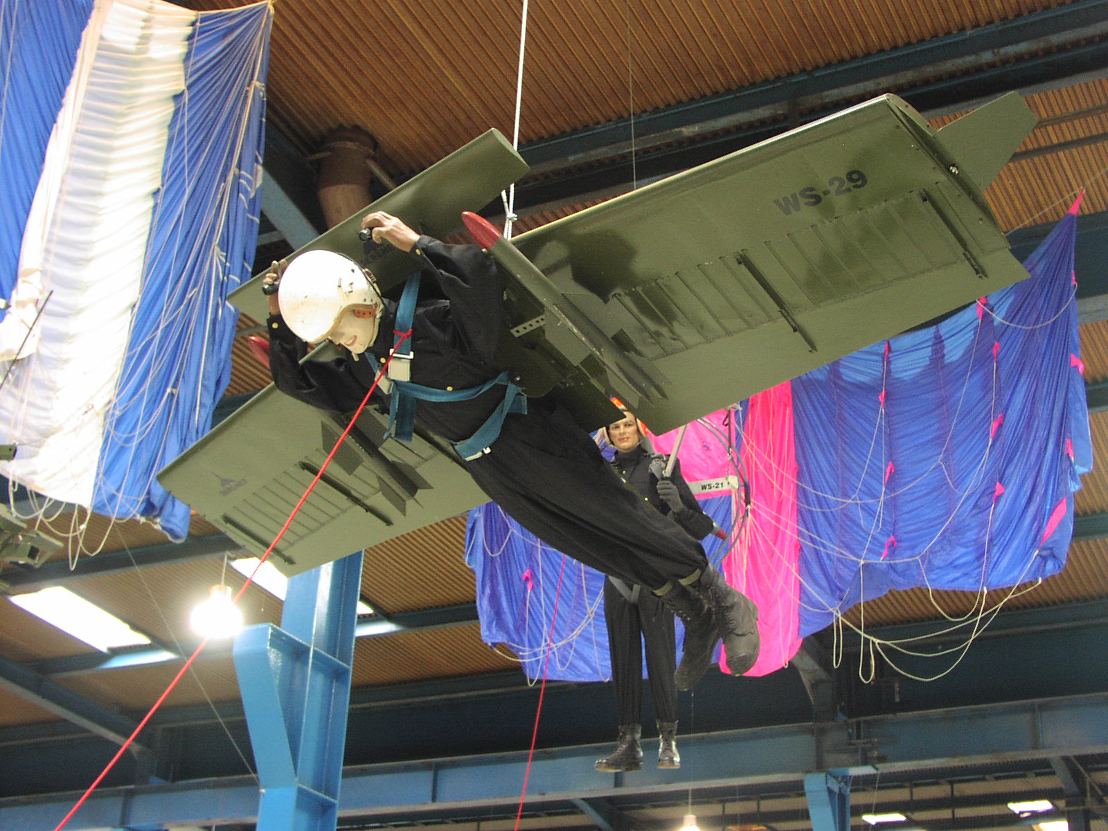 Hátra csatolható repülőgép Helsingørben, a Danmarks Tekniske Museumban (Dánia)